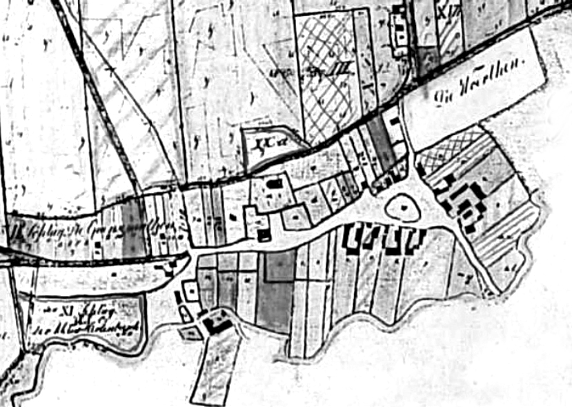 Flurkarte des Ortes Rädike (Fläming) von 1804